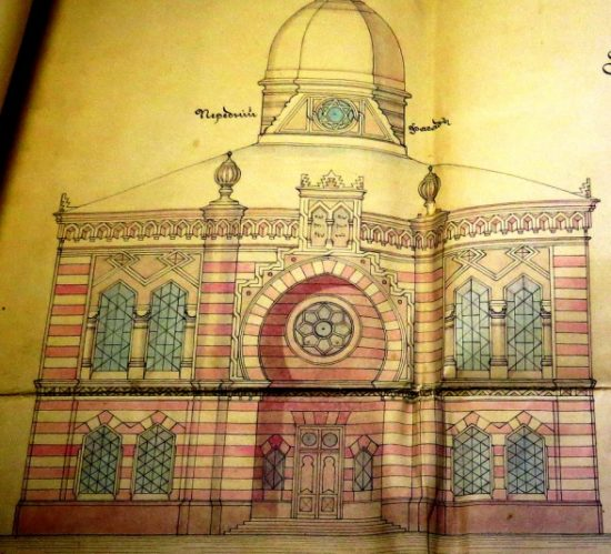 Пярэдні фасад Лідскай вялікай сінагогі